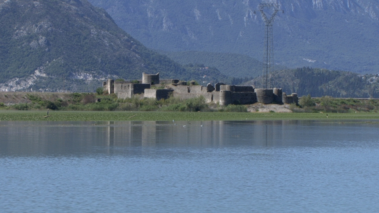 Lago di Scutari